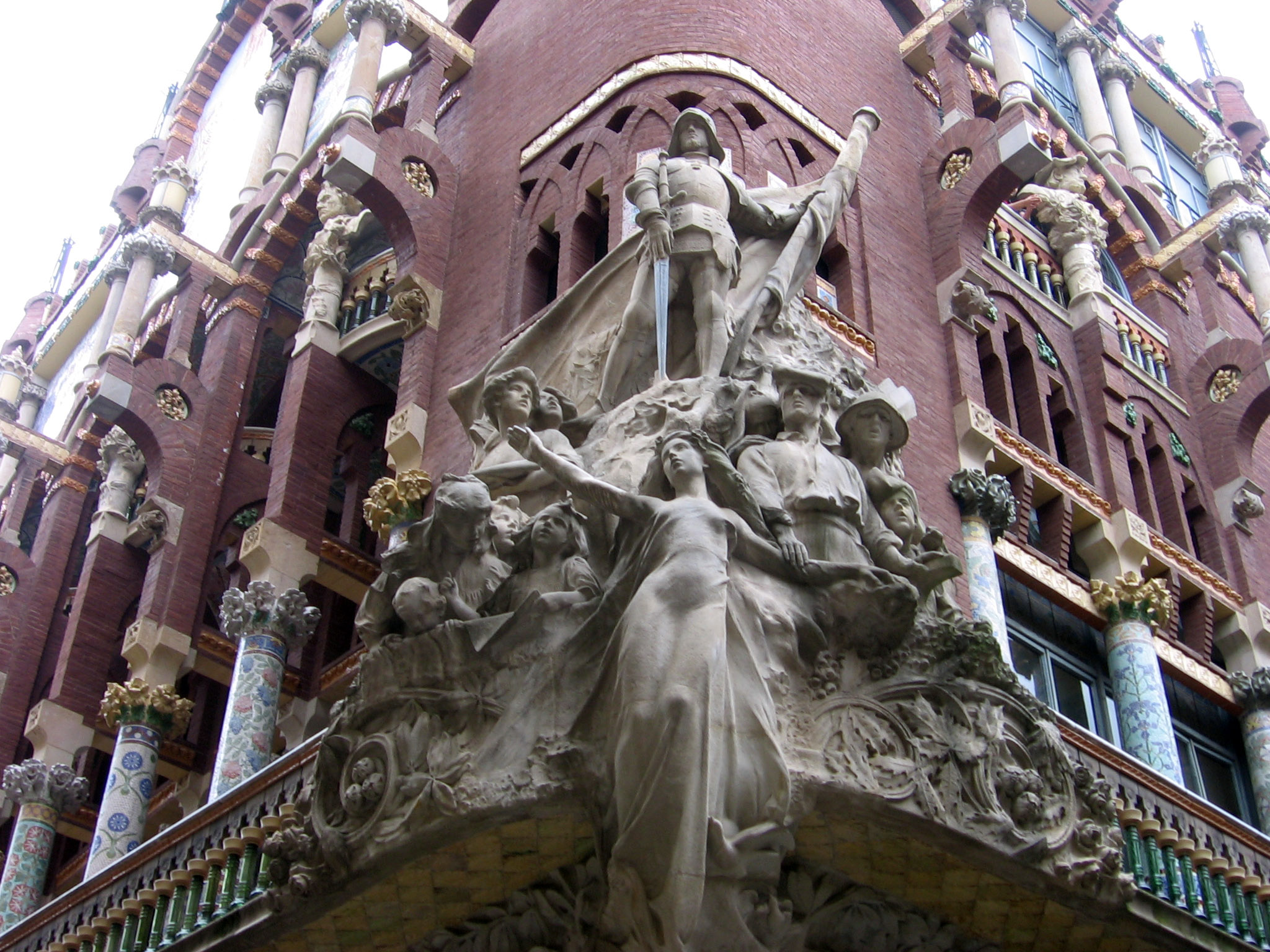 La canción popular, Miquel Blay.